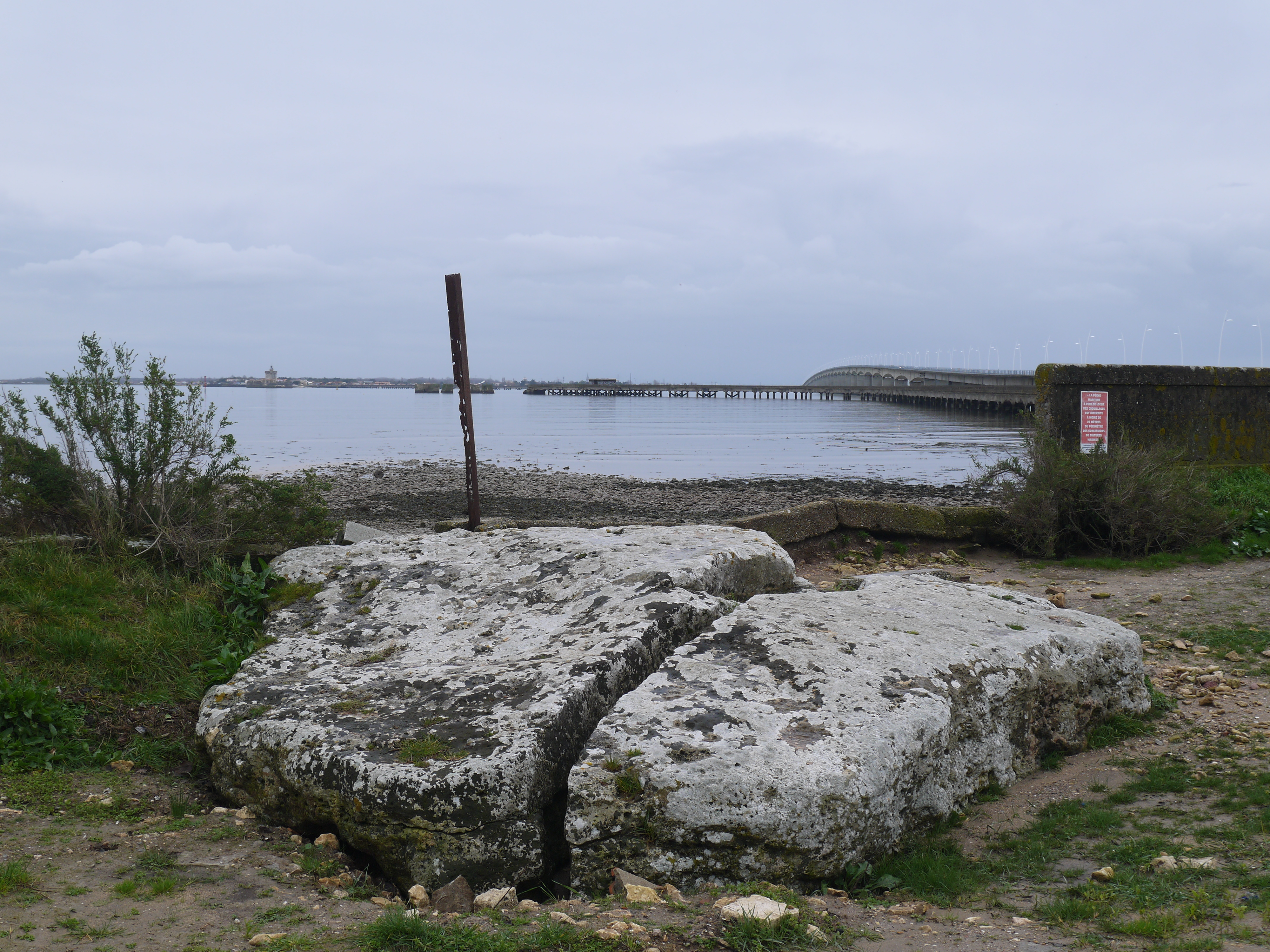 Le dolmen avec, en arrière-plan, le fort Louvois (à gauche) et le pont de l'île d'Oléron (à droite).